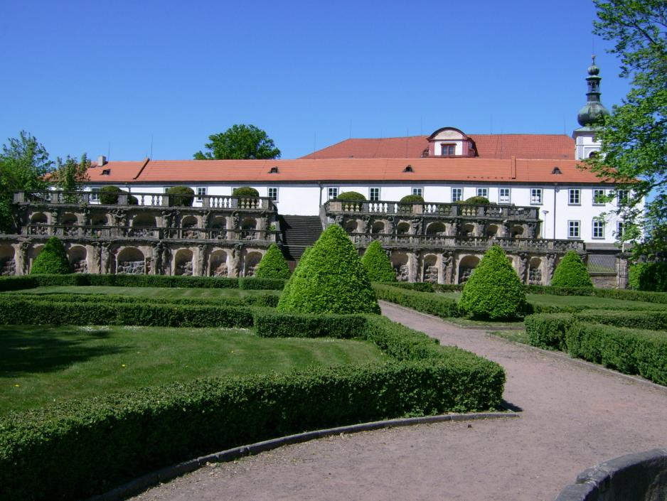 Zámecká zahrada v Zákupech